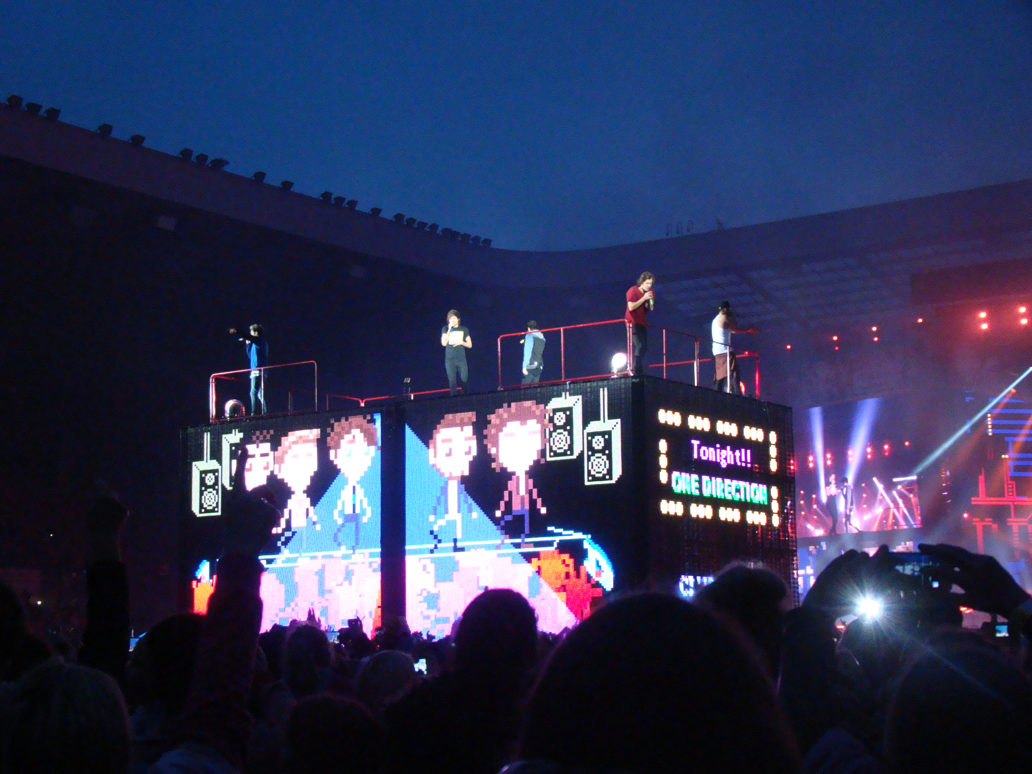 One Direction